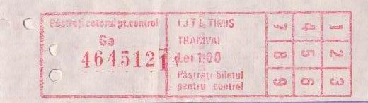 Bilet tramvai Timisoara